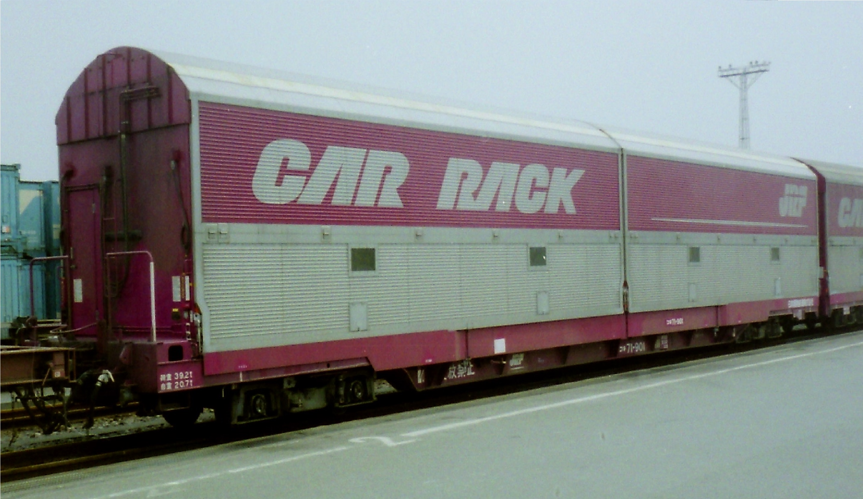 名古屋貨物ターミナル駅構内で今は無きカートレインへ、カーラックコンテナを積載している作業風景。